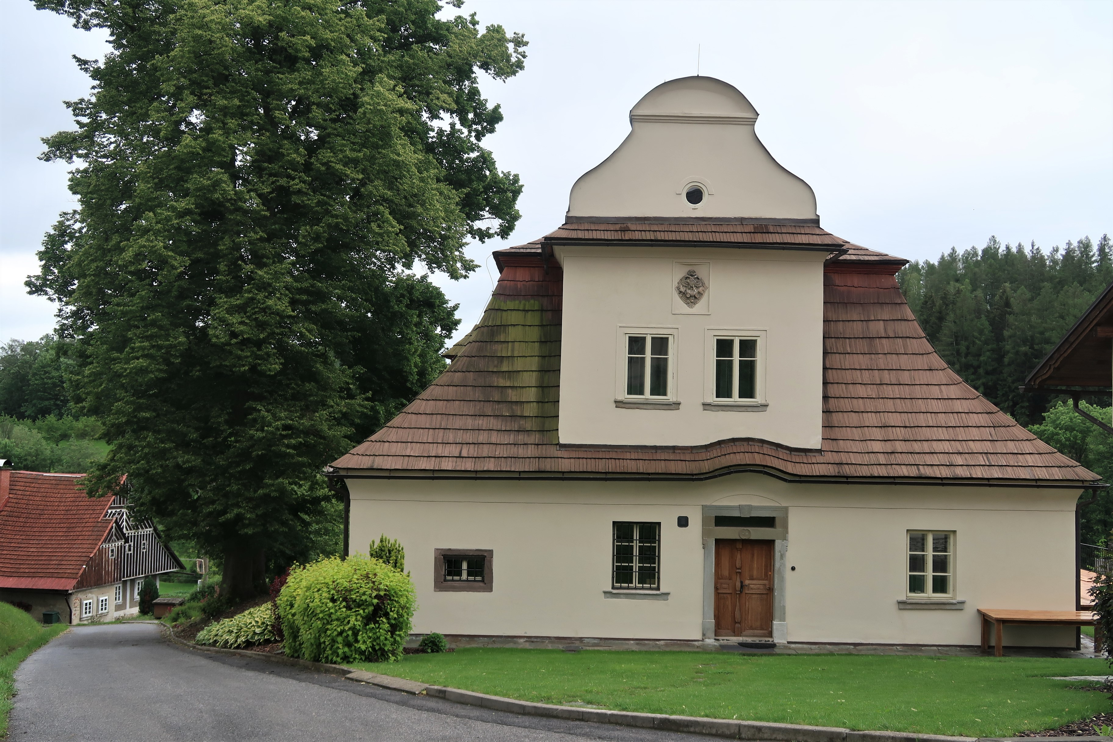 Barokní budova fary pod kostelem v Roprachticích